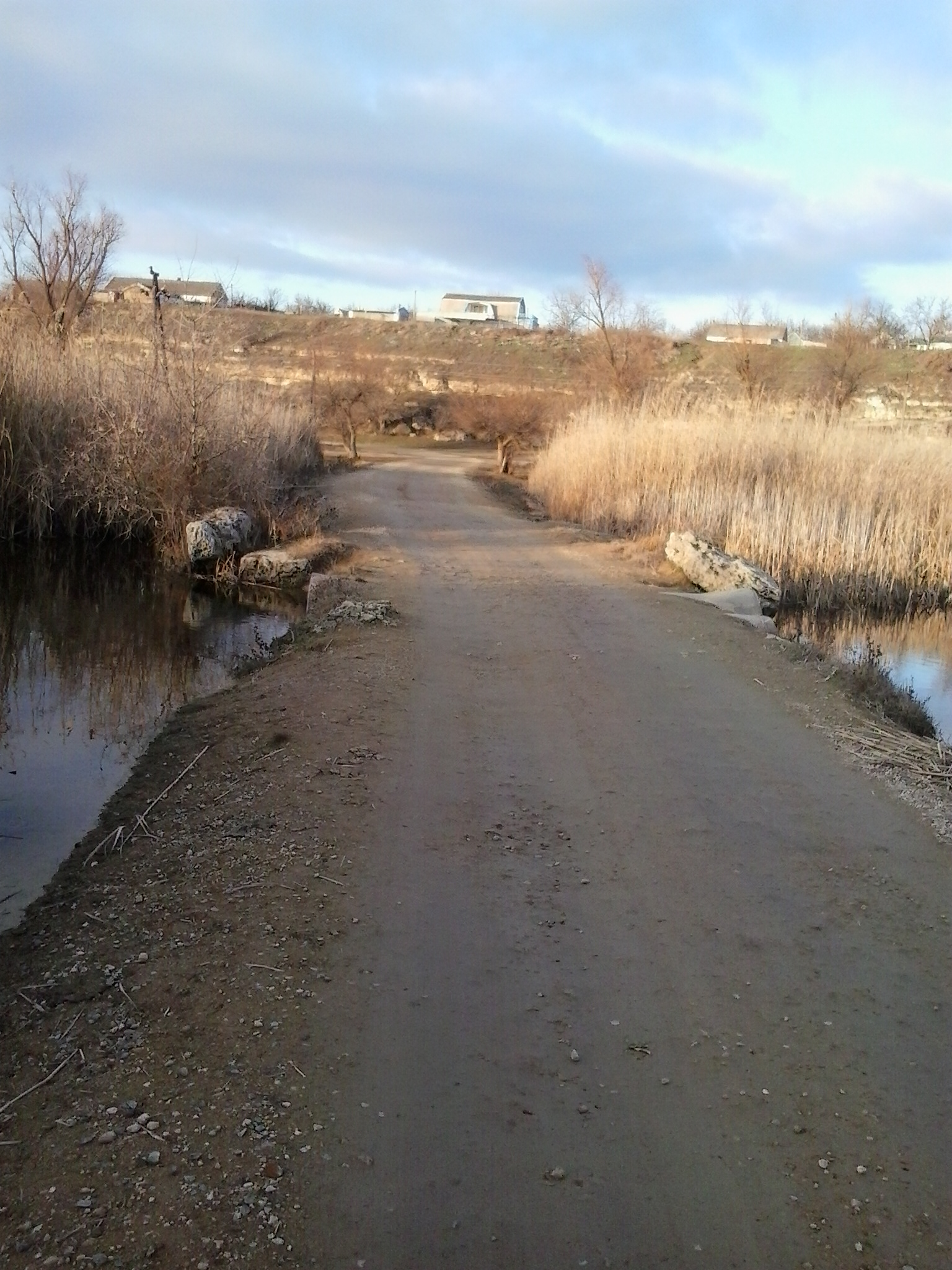 Дорога с острова